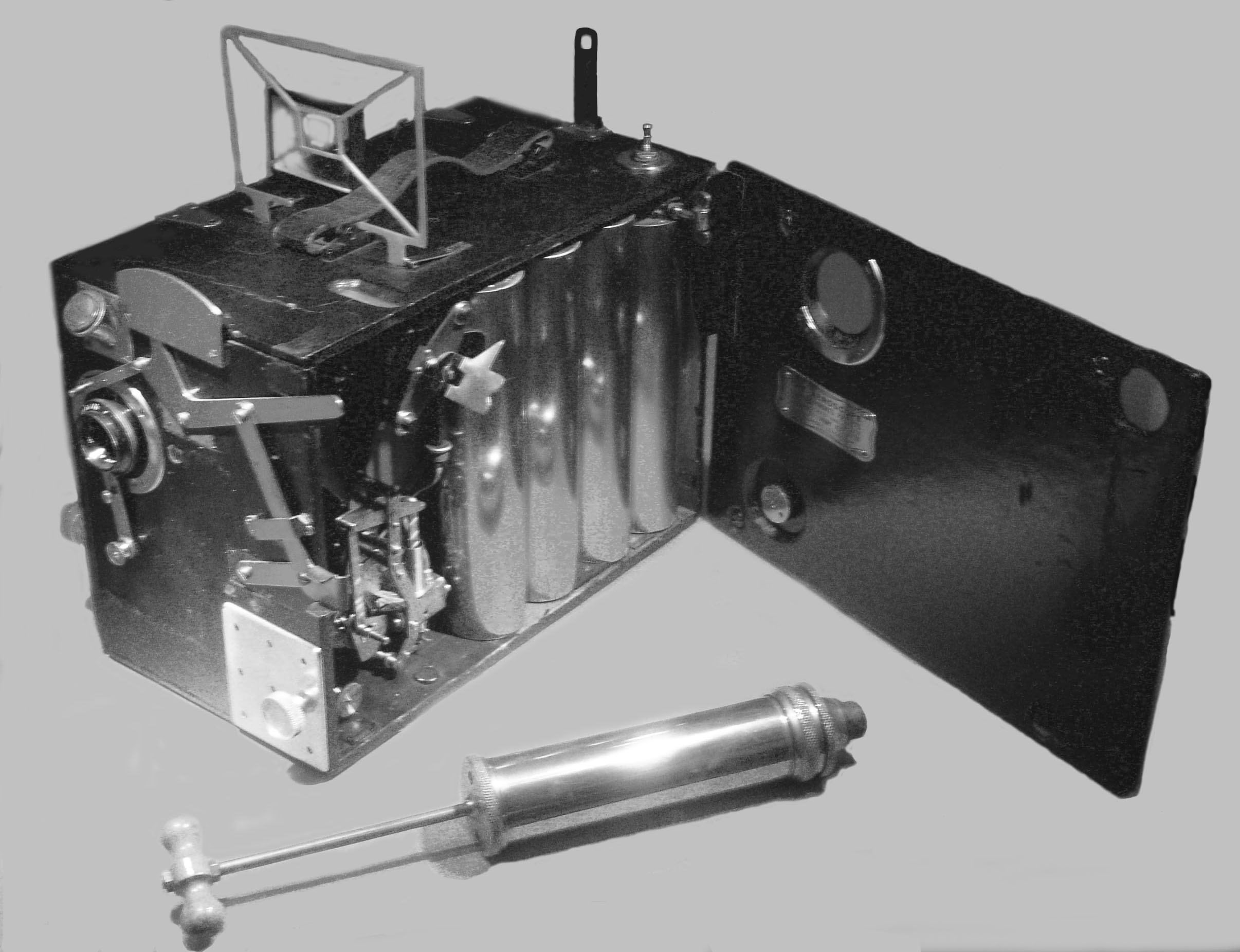 Caméra film 35 mm Sinclair Aéroscope (1909). Fonctionne à l'air comprimé. On aperçoit les 4 réservoirs que l'on peut remplir après usage grâce à la pompe. La visée est effectuée par un viseur sport installé au-dessus de la caméra. Concepteur : Kazimierz Prószyński.